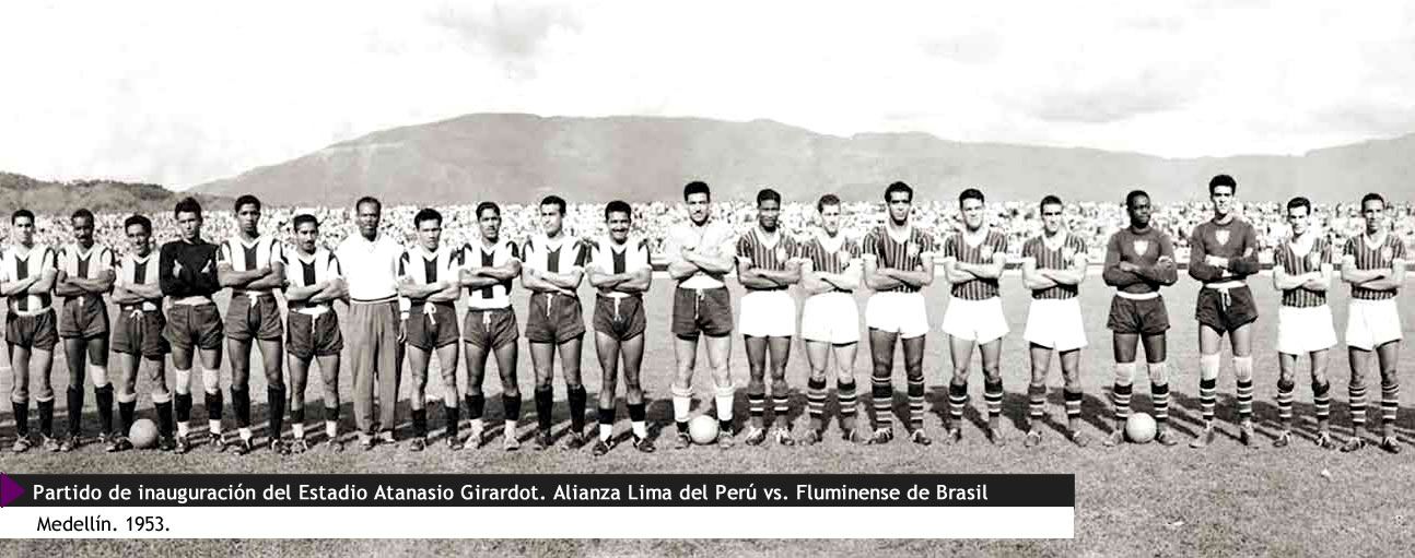 Partido de inauguración del Estadio Atanasio Girardot de Medellin, Colombia. Alianza Lima del Perú vs. Fluminense de Brasil 28/03/1953 - Alianza de Lima 2 x 2 Fluminense - Torneo Cuadrangular de Medellín 1953 - Atanasio Girardot (Medellín, Colômbia)